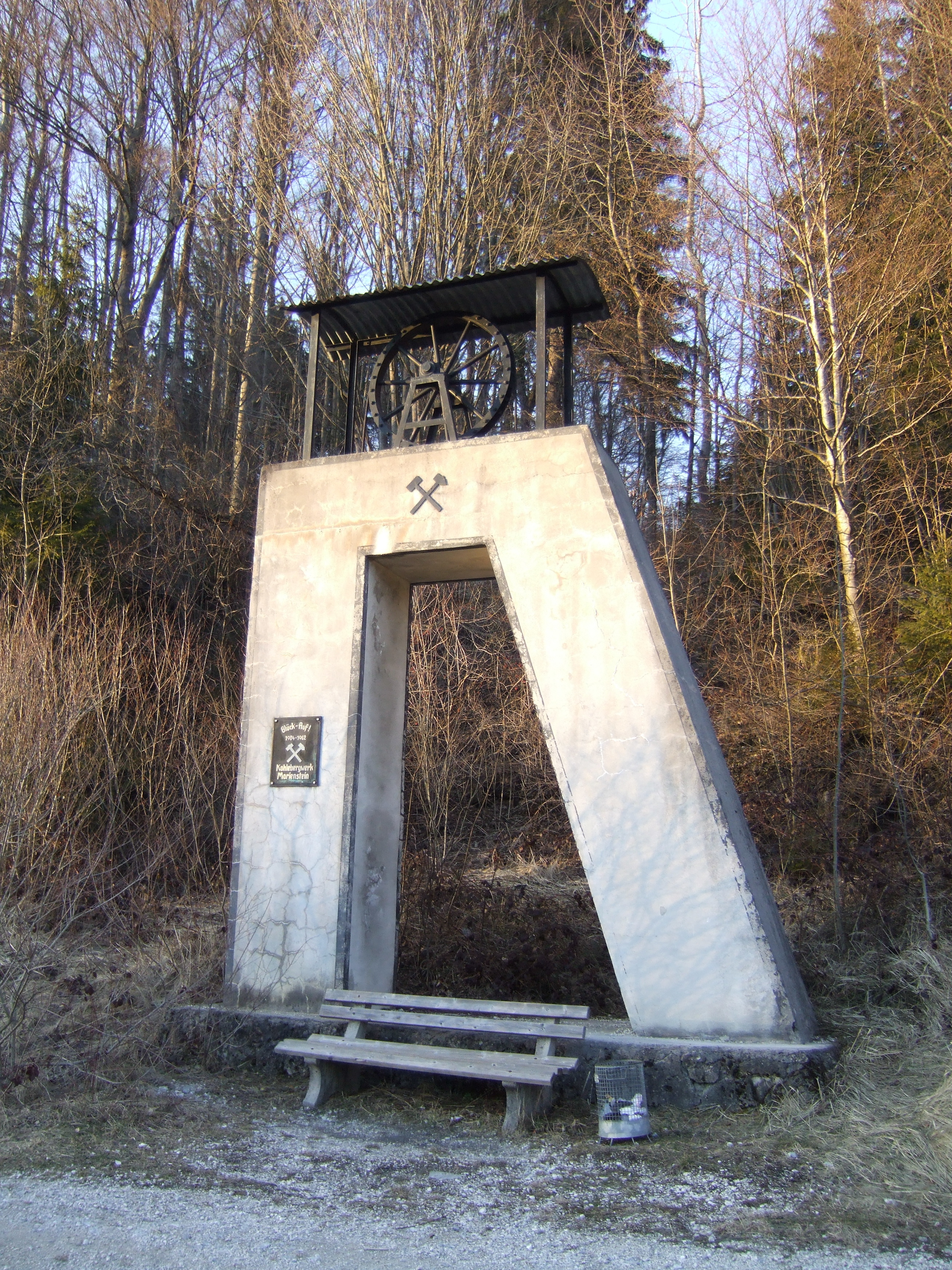 Kohelbergbau Denkmal Marienstein